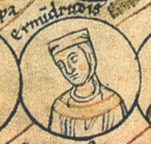 Ermentrude de Roucy